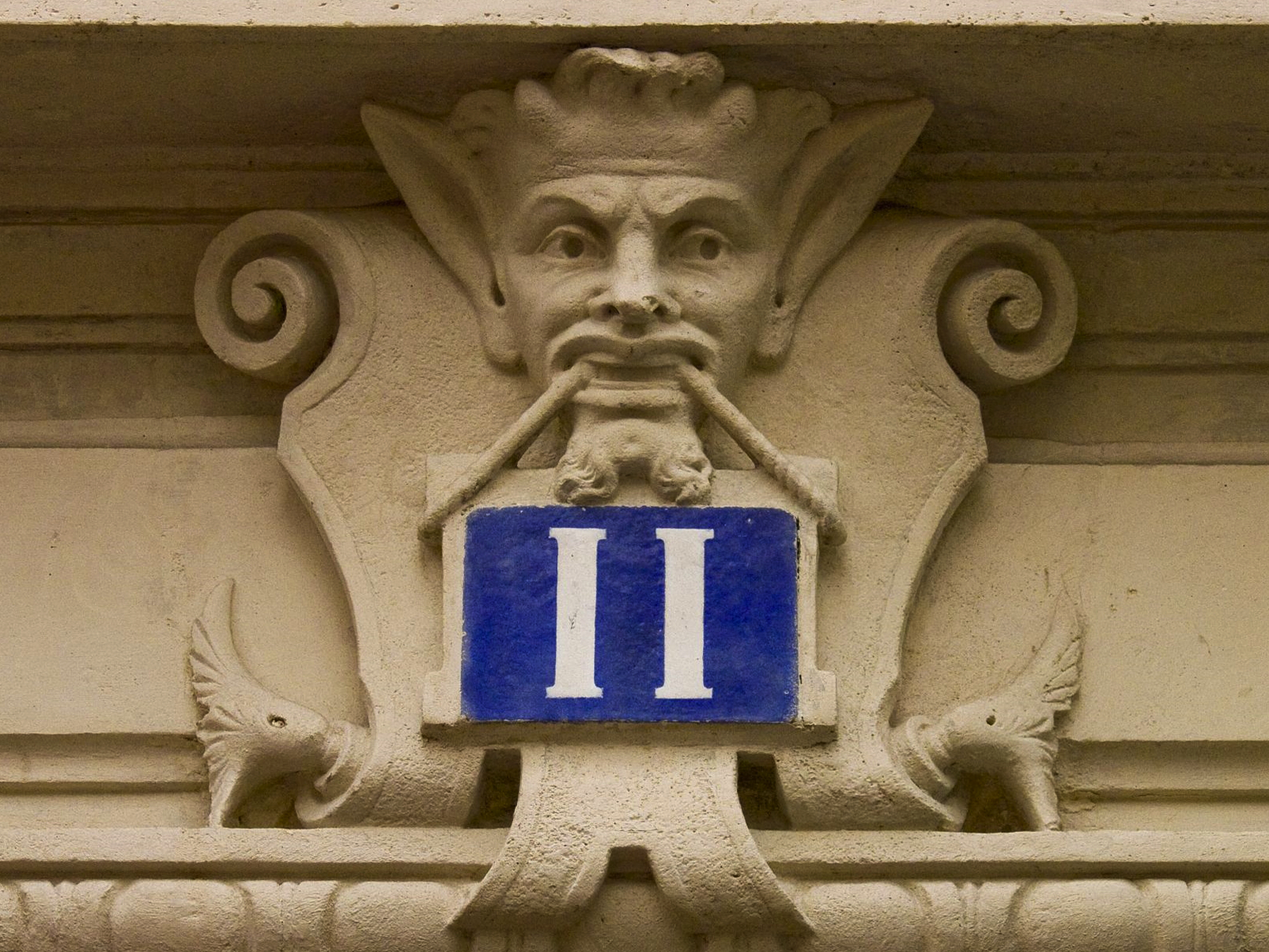 Numéro d'immeuble intégré au décor de la façade, 11 boulevard Arago, Paris 13e. 2e partie du 19e siècle.